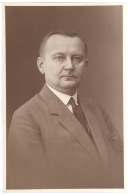 Peeter Hansen